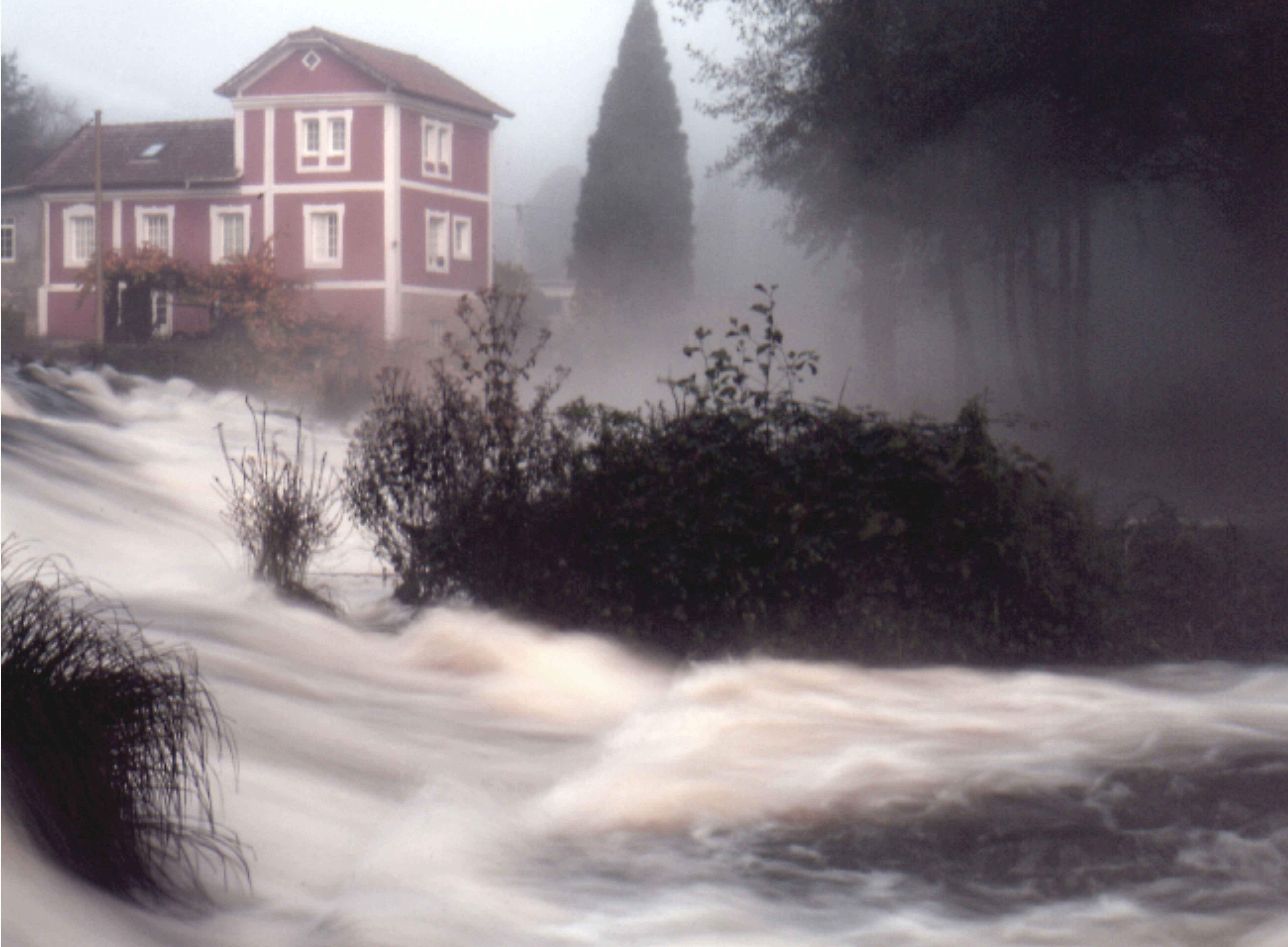 Cecebre